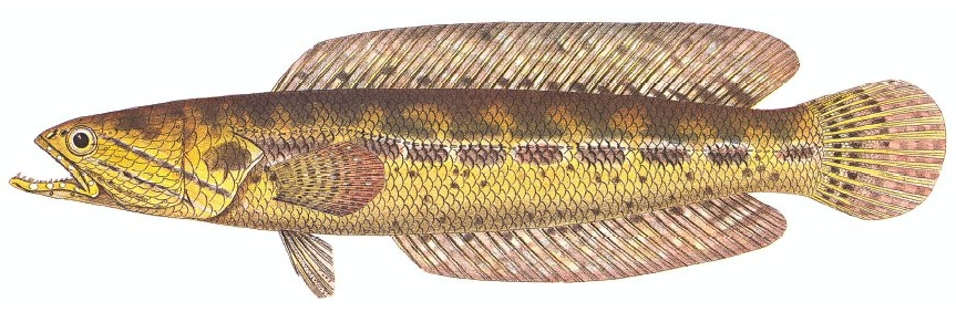 Channa bankanensis after Bleeker, 1878